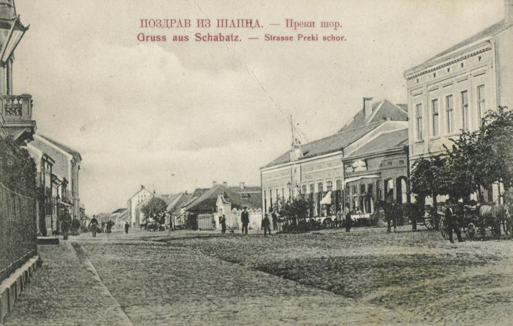 Srpski (latinica): Preki sor, Sabac